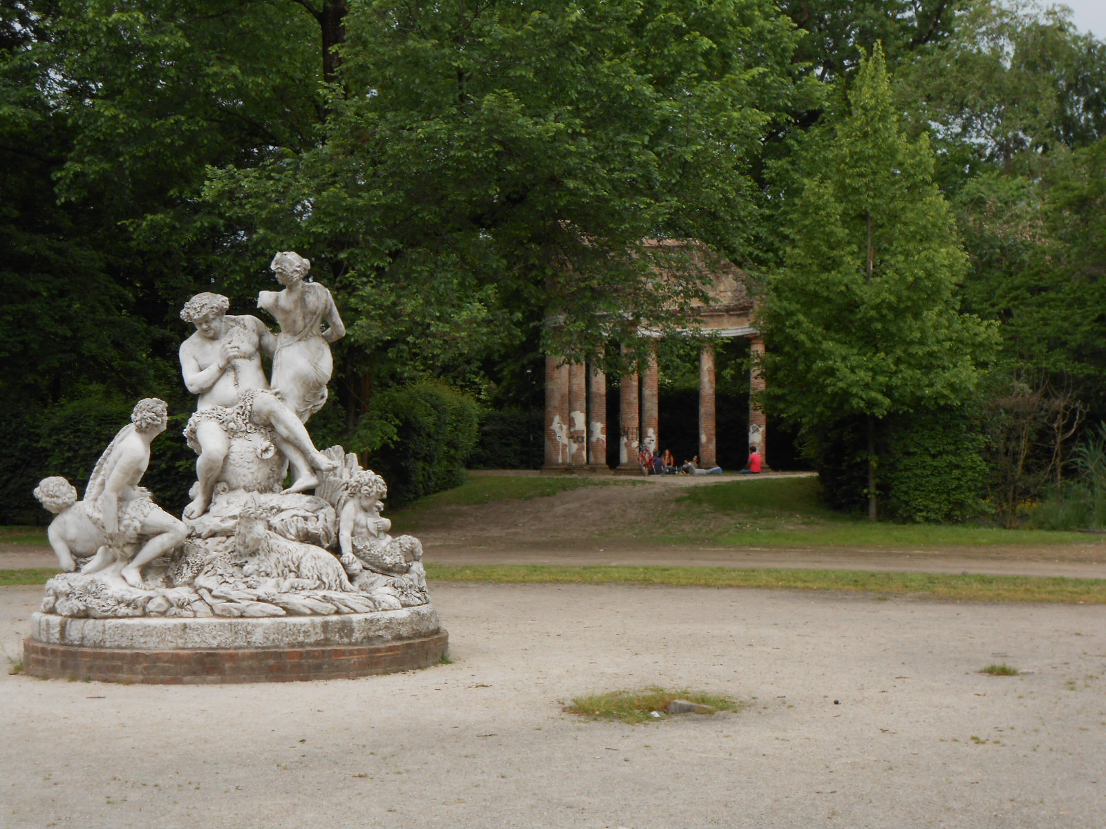 Parco Ducale This is a photo of a monument which is part of cultural heritage of Italy.